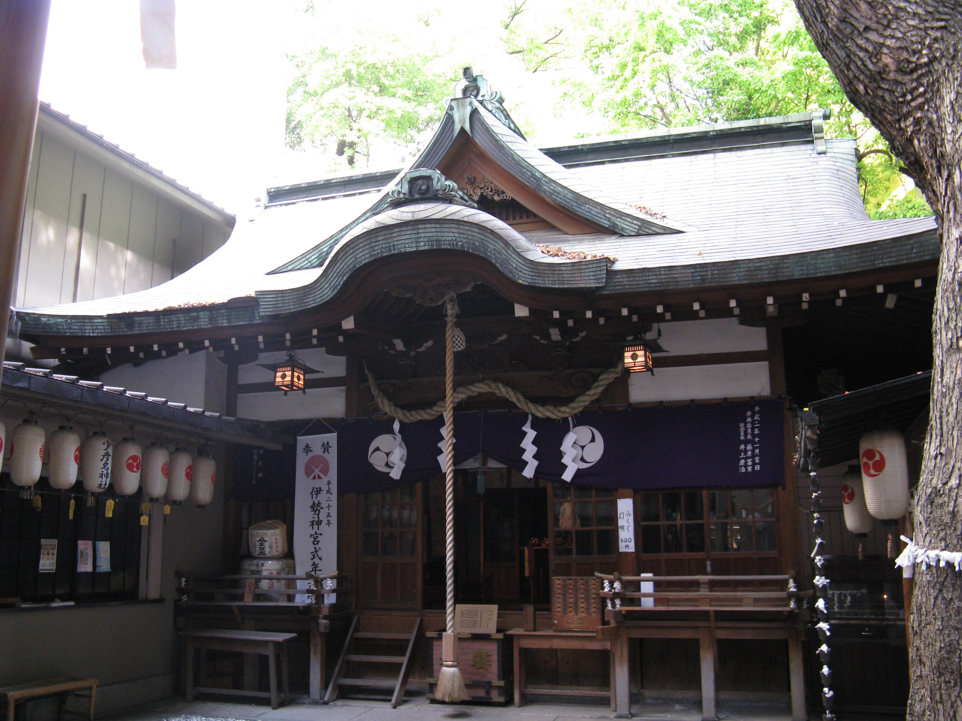 少彦名神社